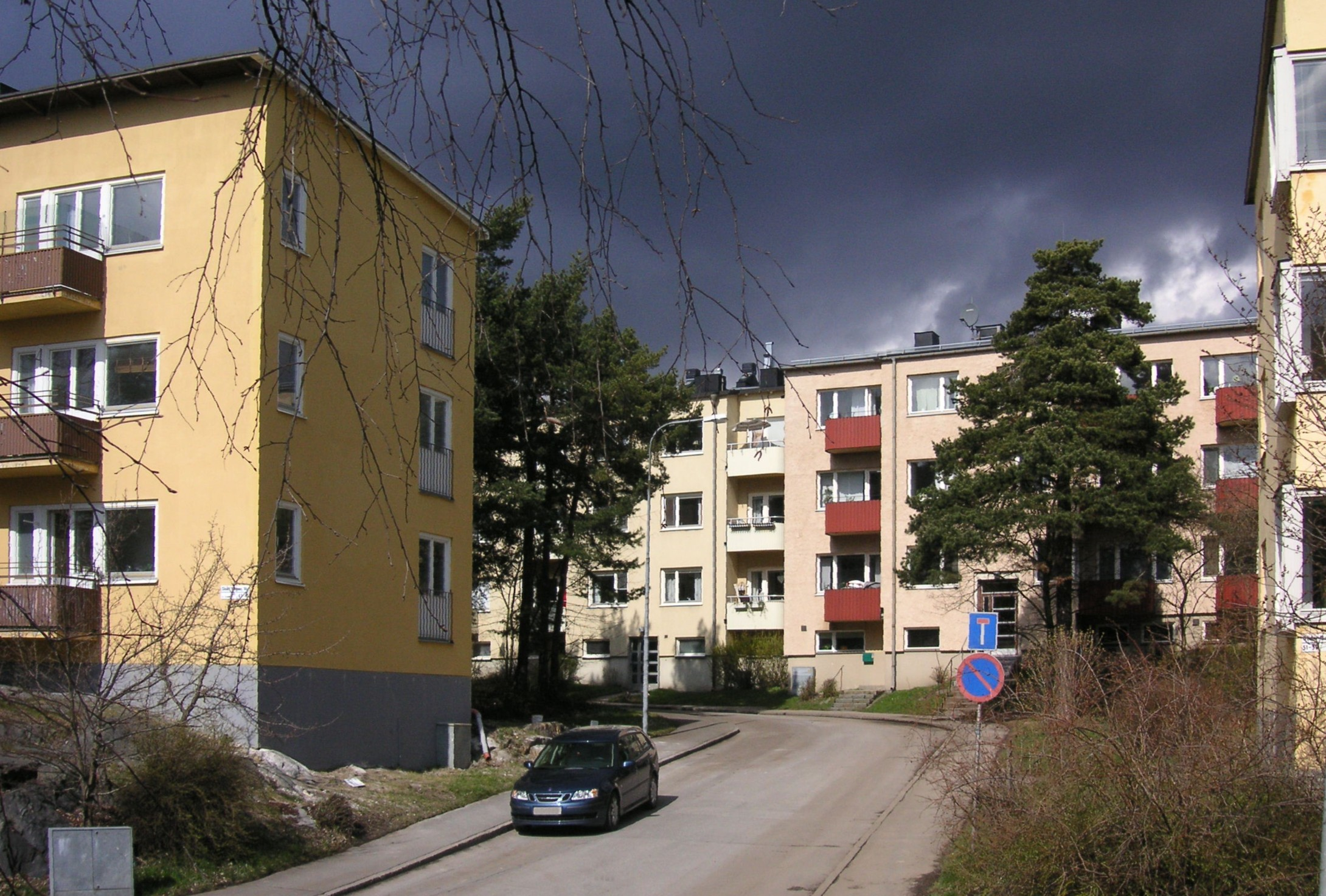 Från Olaus Magnus väg mot Björnståhlsgatan på Hammarbyhöjden i Stockholm